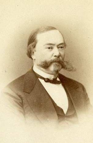 Eestimaa rüütelkonna peamees Hermann von Benckendorff (1815-1883)